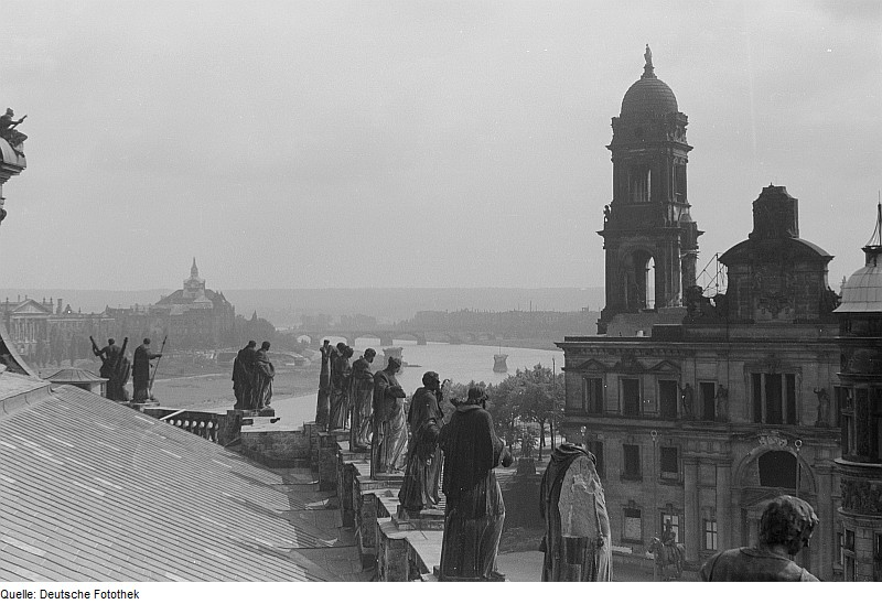 Original image description from the Deutsche FotothekBlick vom Dach der Hofkirche auf die Elbe